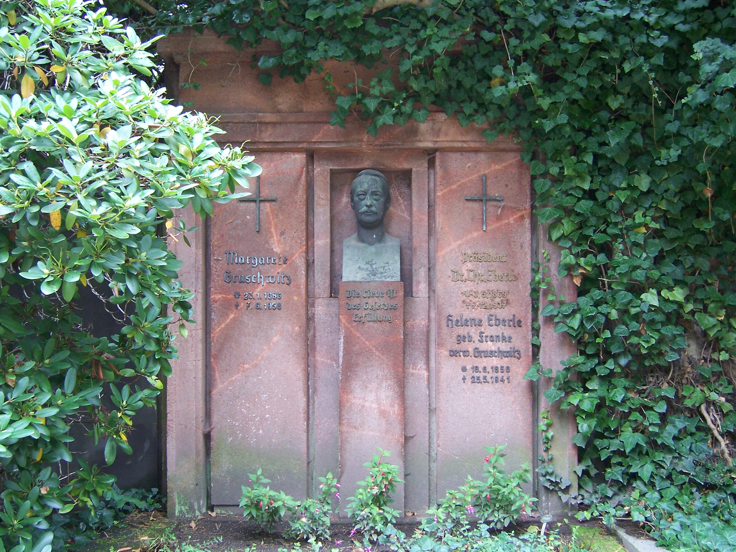 Grab des Präsidenten des Sächsischen Sparkassen- und Giroverbandes Johann Christian Eberle auf dem Johannisfriedhof in Dresden.